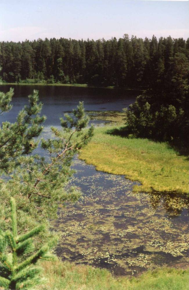 Kooraste Kõverjärve lõunaots